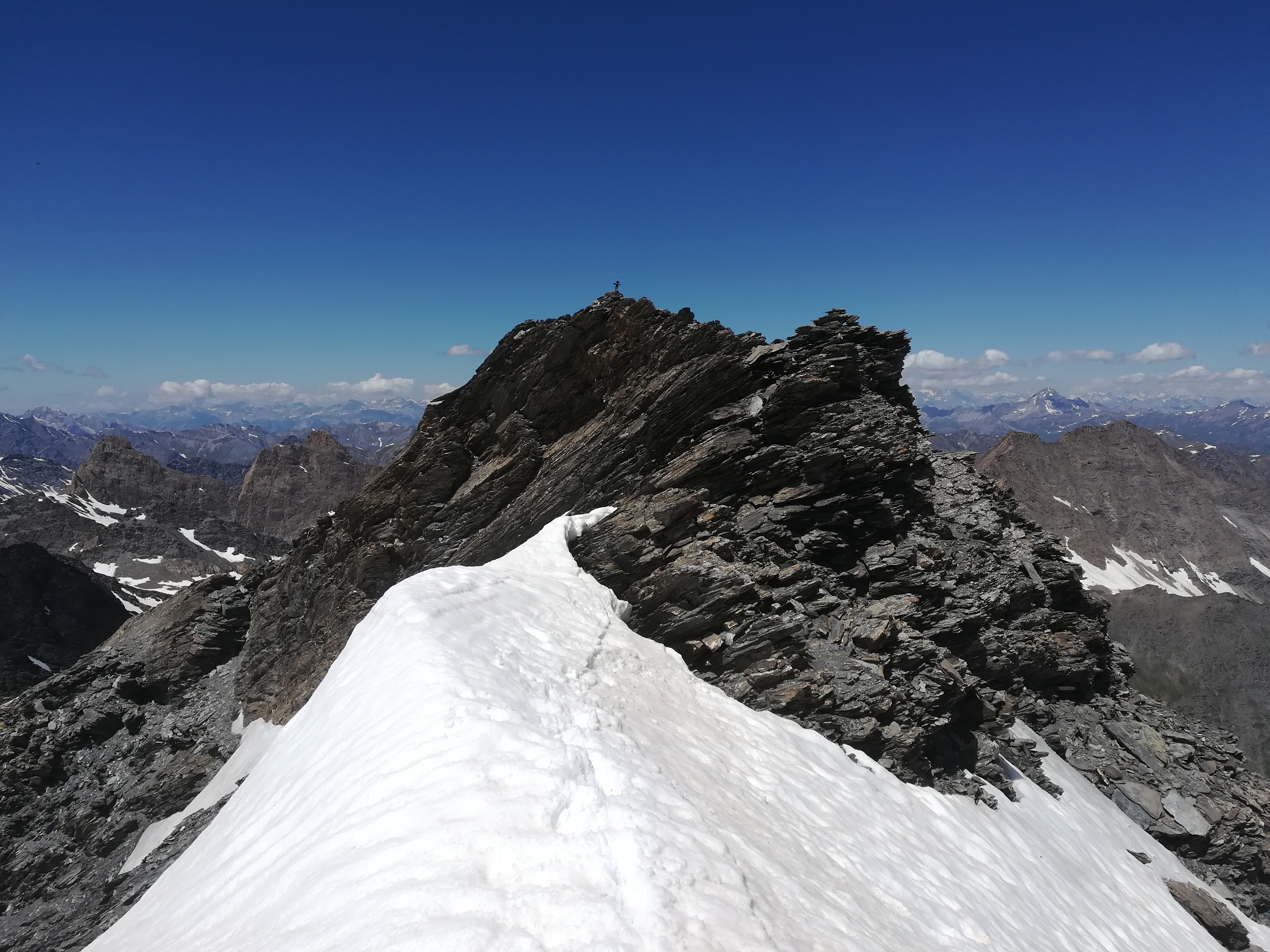 La vetta del monte Aiguillette. Si nota la vetta bifida. Quella est in primo piano e quella est con la croce in secondo piano.